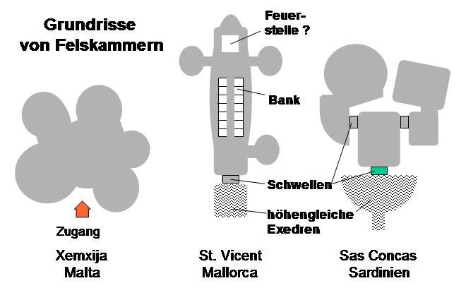 Felsengräber